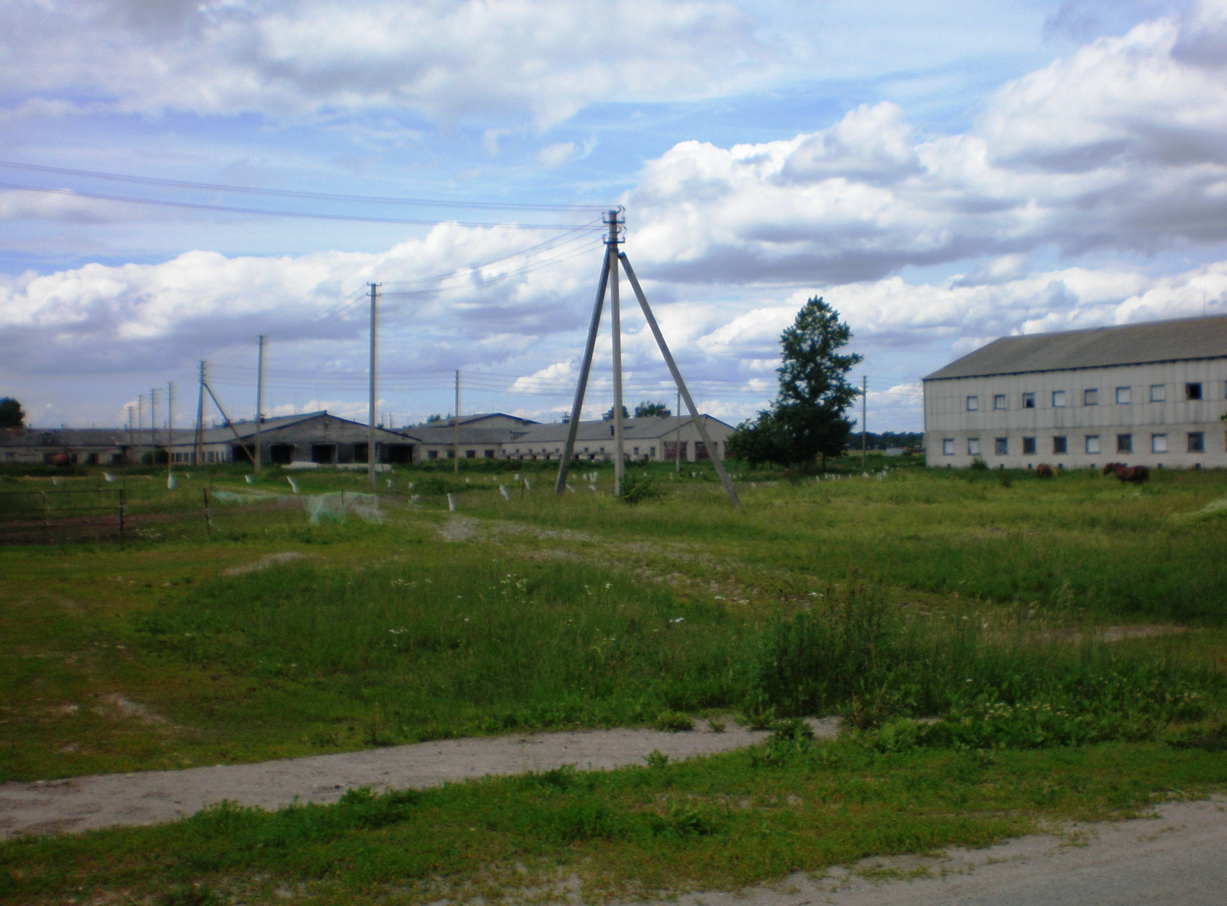 Aušros k. fermos, Dotnuvos sen., Kėdainių raj.